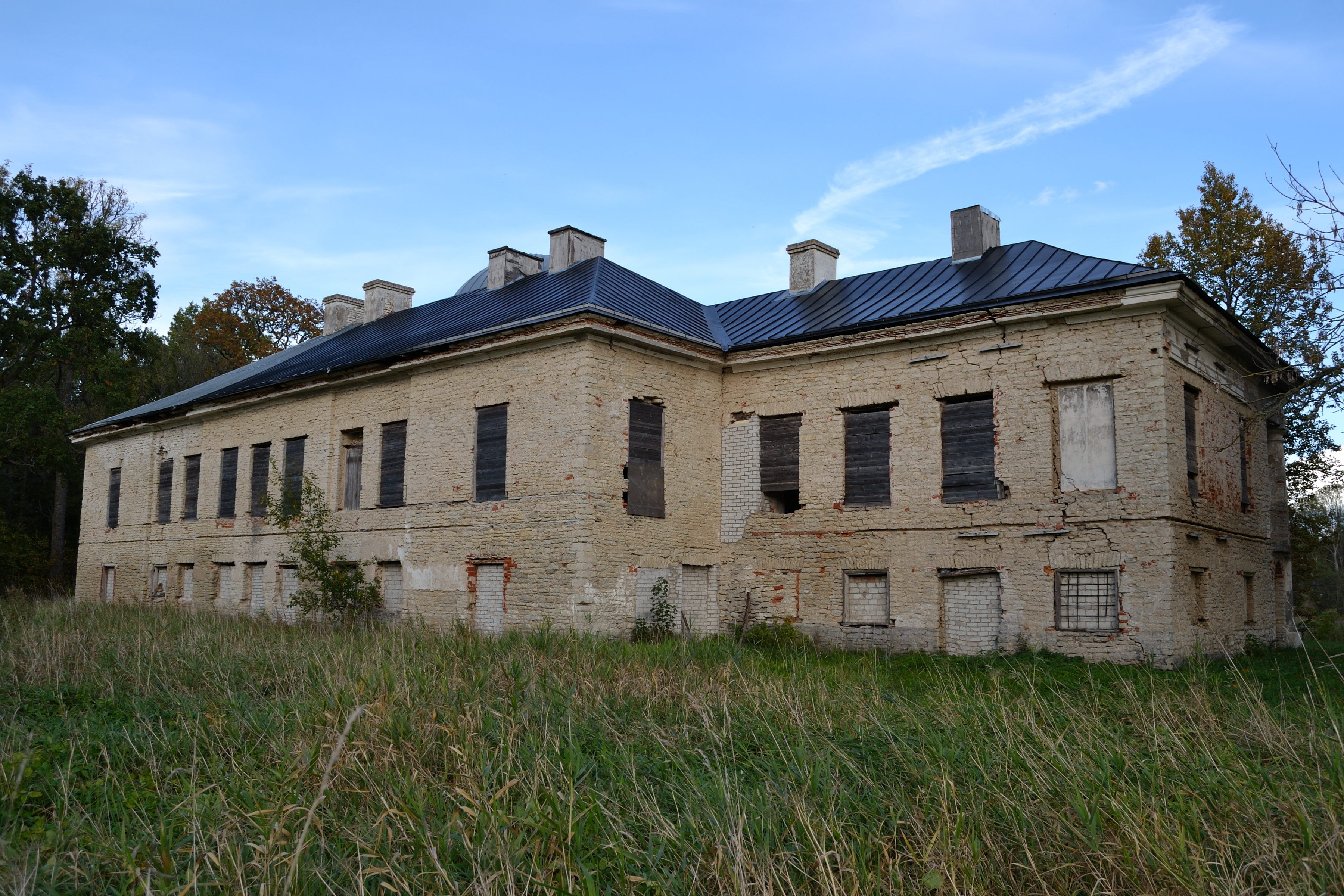 Hõreda mõisa peahoone